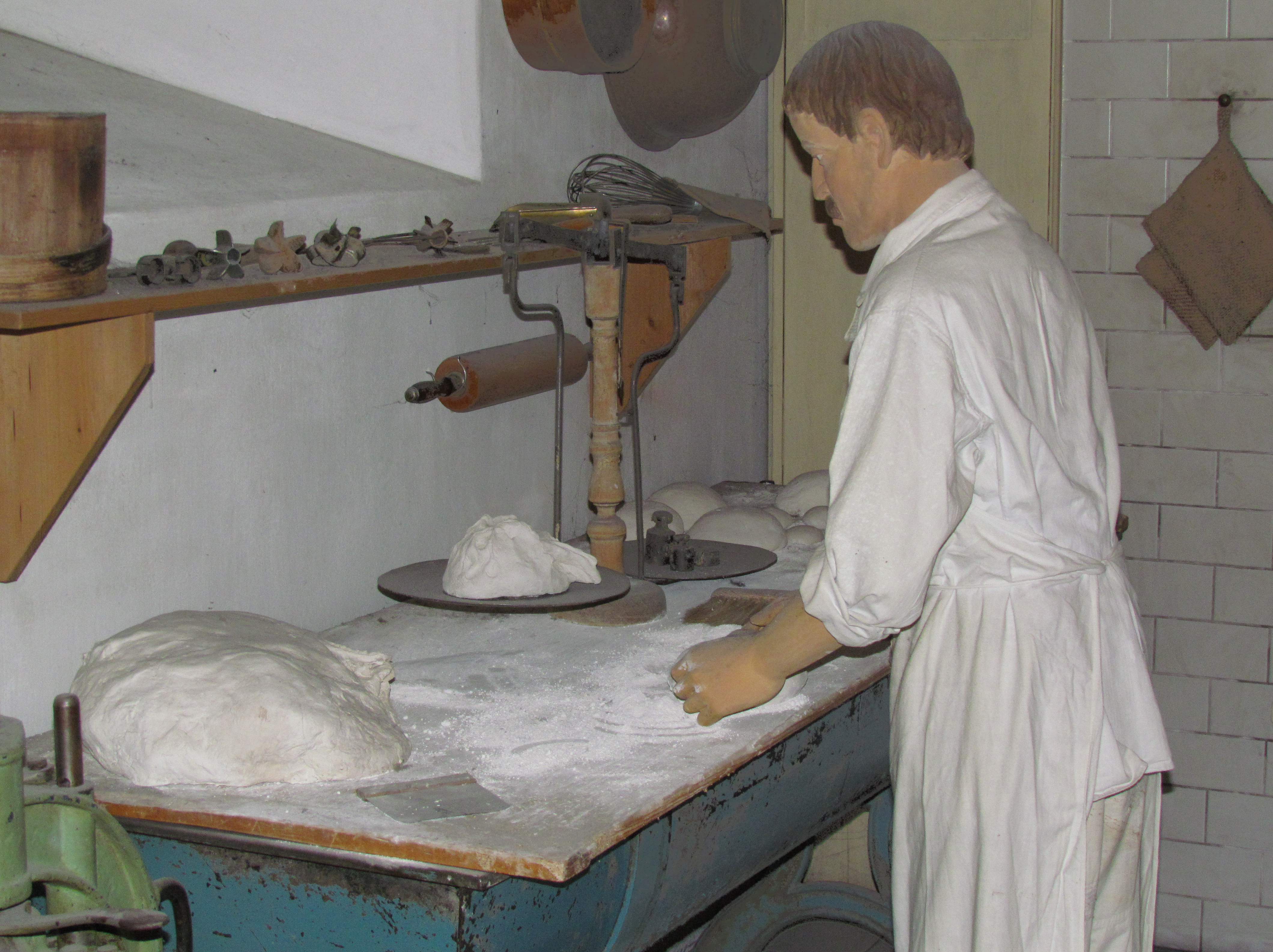 Bildinhalt: Brotaufmachen im Museum der Brotkultur in Ulm Aufnahmeort: Ulm, Deutschland